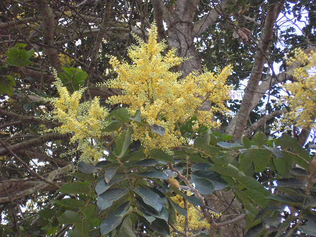 Tachigali paniculata (Carvoeiro), município de Bonfinópolis de Minas, Minas Gerais, Brasil. Autor: Denis A. C. Conrado